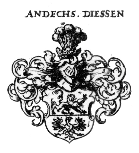 Wappen der europäischen Adelsfamilie Dießen-Andechs-Meranien - Grafen des Heiligen Römischen Reiches